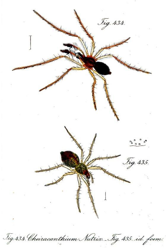 Cheiracanthium Nutrix (im Sinne von Carl Ludwig Koch 1839) Ch. punctorium (Villers, 1789), Männchen (Fig. 434) und Weibchen (Fig. 435), Erstbeschreibung der Gattung Cheiracanthium C. L. Koch, 1839